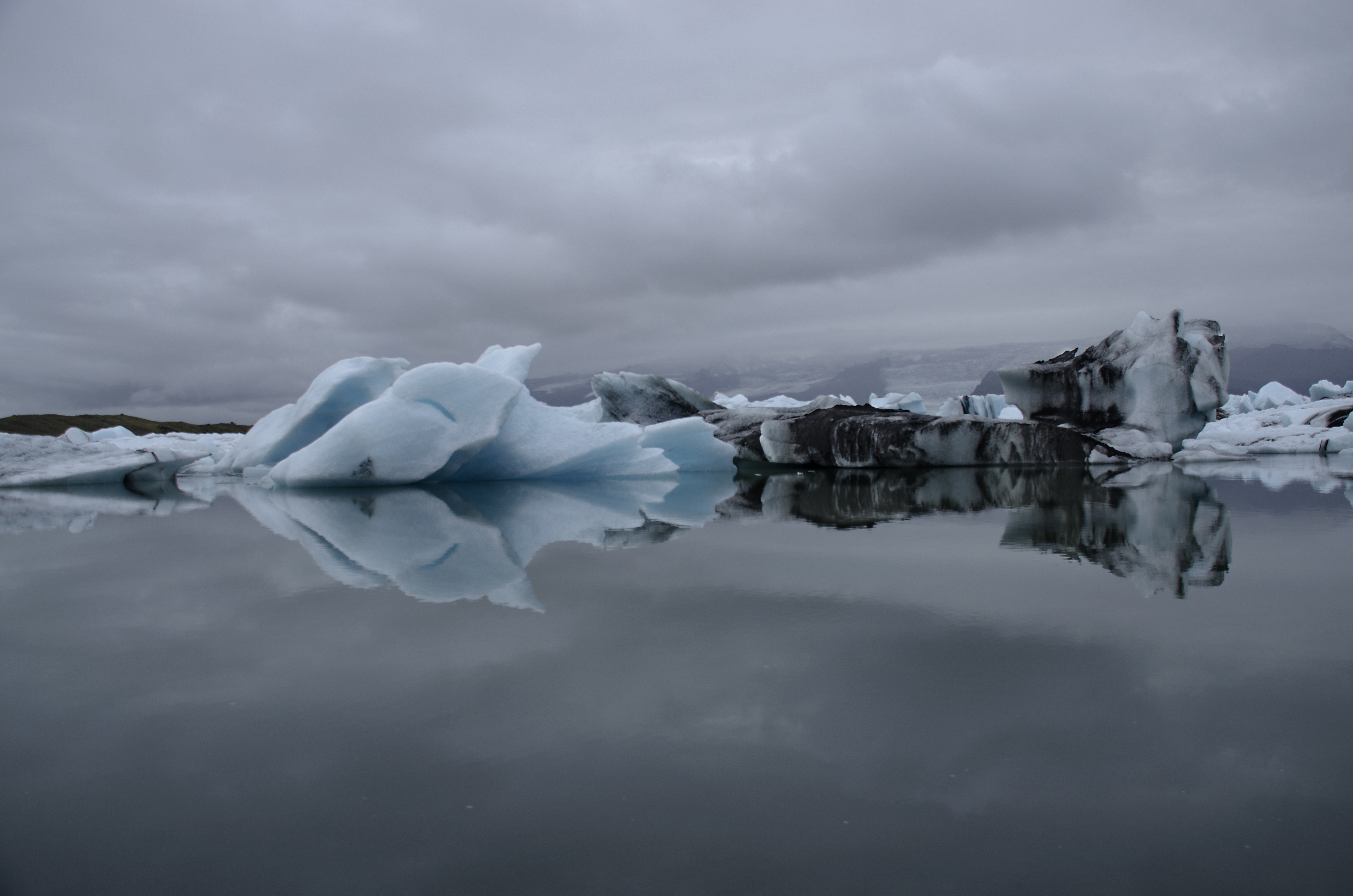 Icebergs on Jökulsárlón, Iceland